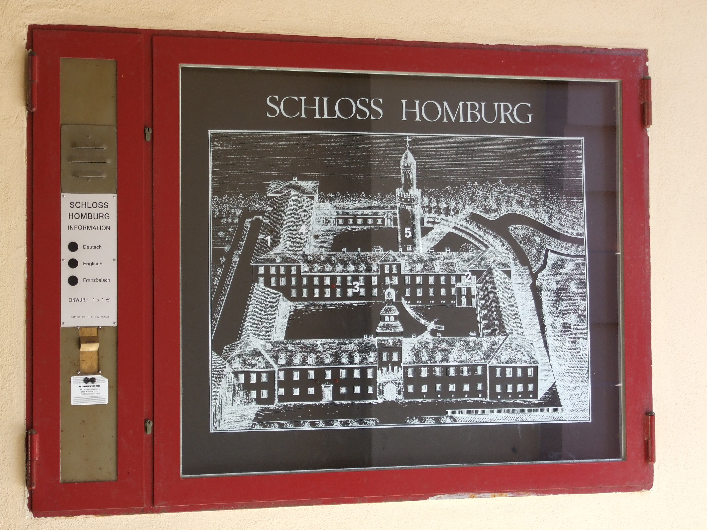 Schloss in Bad Homburg, Skizze.